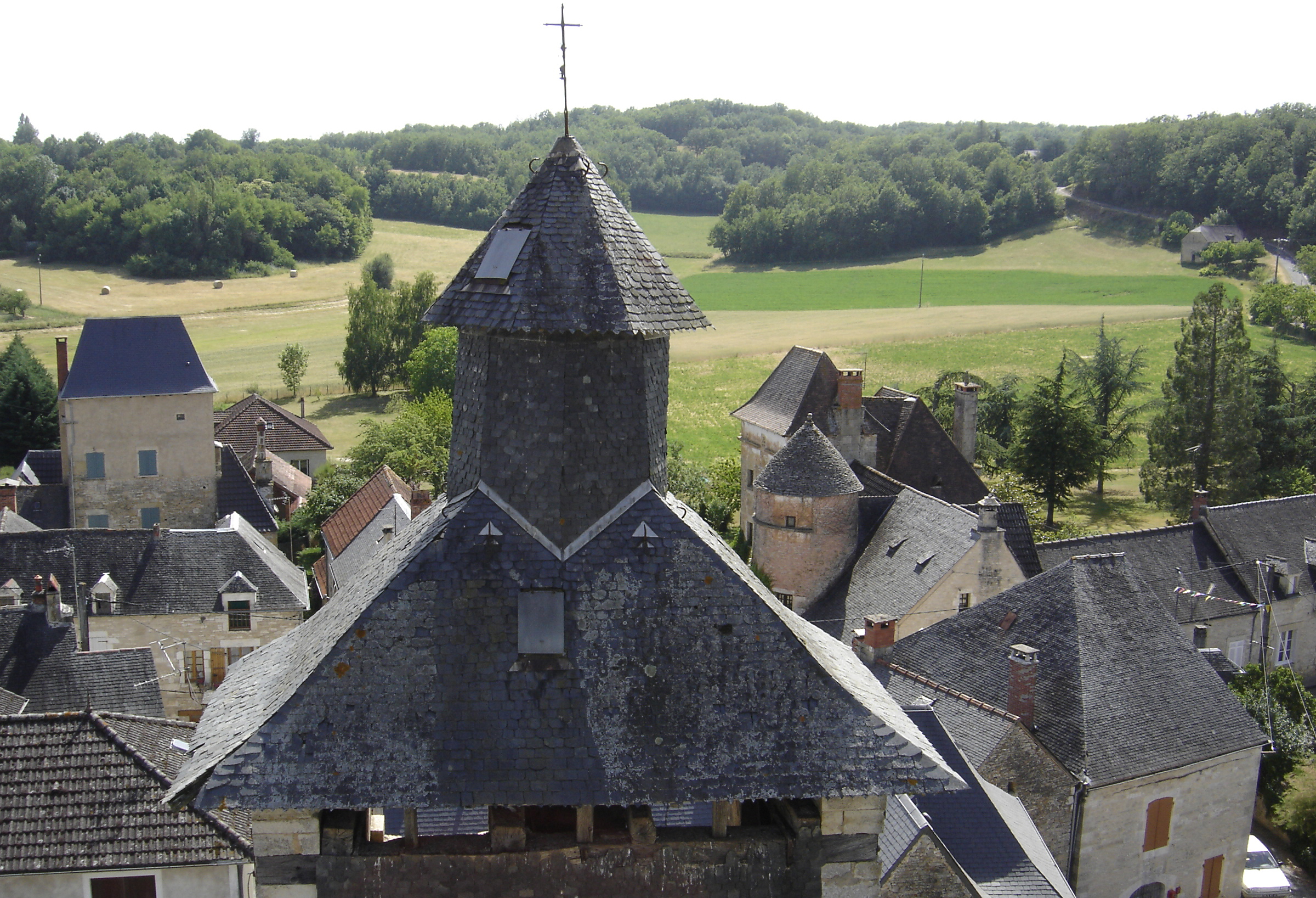 Clocher XVIIIe siècle de l'église Saint Martin (1714)